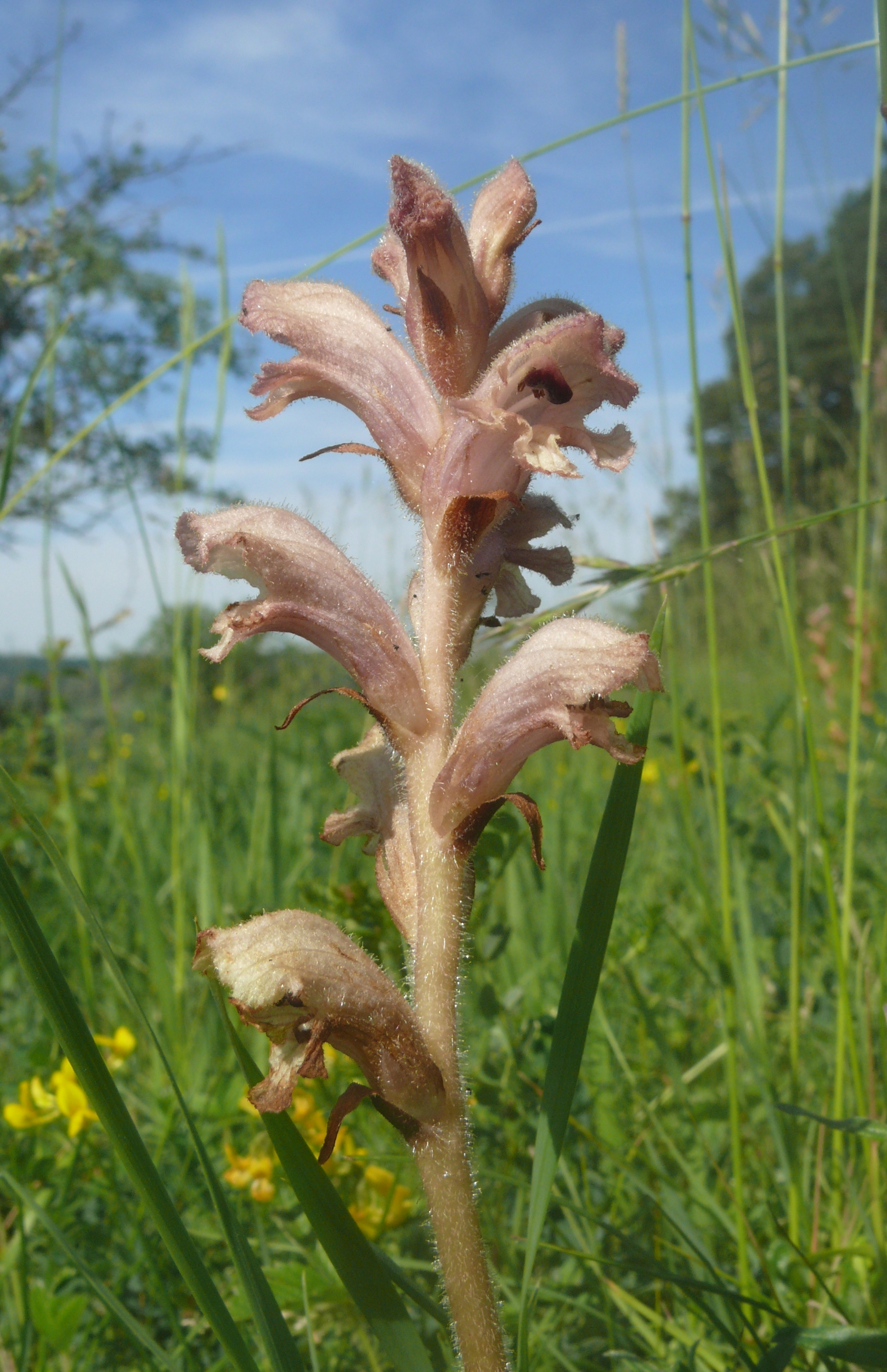 Orobanche teucrii, Bauland